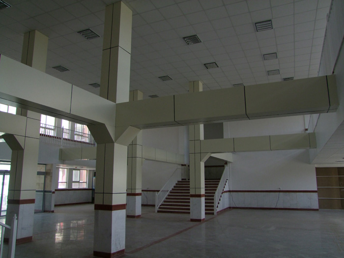 آزمايشگاه ها و کارگاه های آموزشکده سما با تجهیزات جدید و پیشرفته که در سطح مشهد توسط سایر دانشگاه ها که این امکانات را ندارند از طریق بستن قرارداد با آموزشکده سمامشهد، مورد استفاده قرار می گیرند.